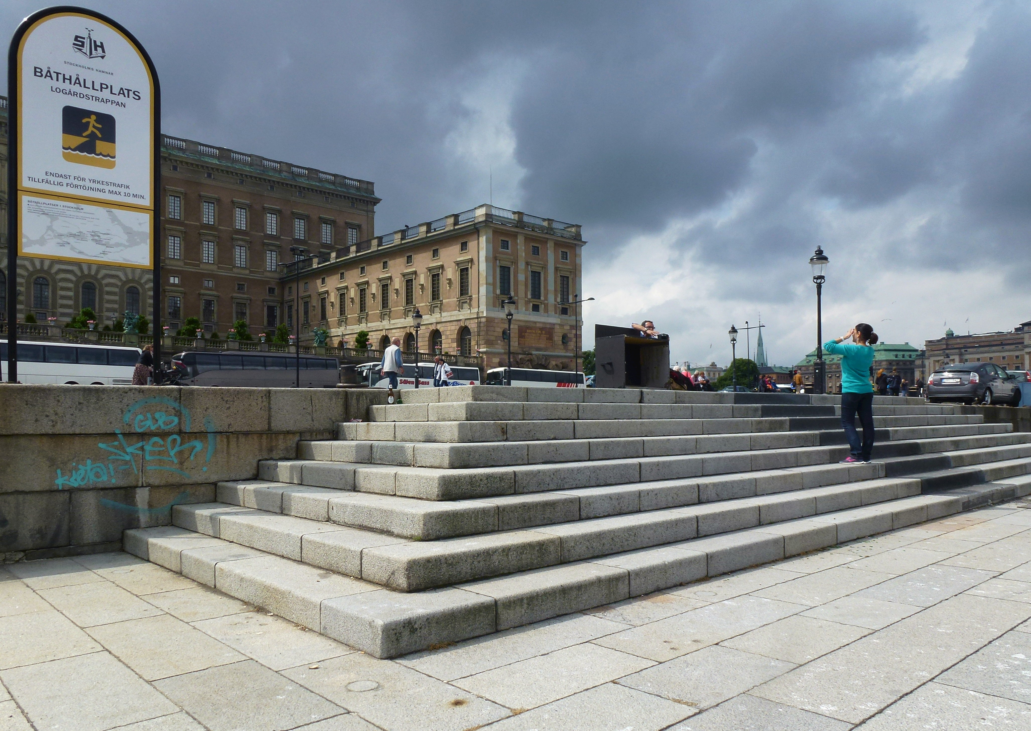 Logårdstrappan